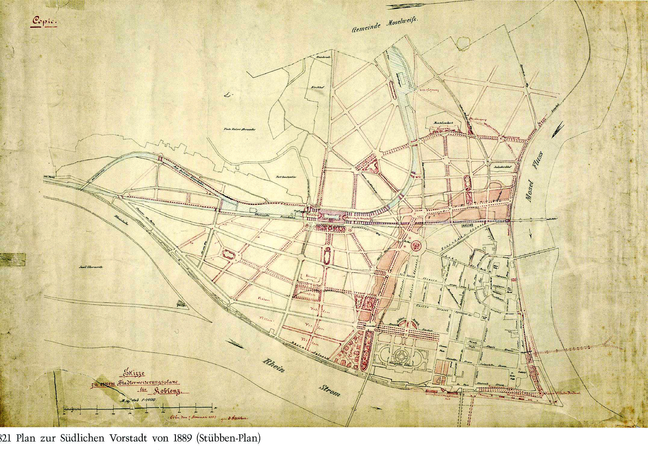 Übersichtsplan zur Koblenzer Stadterweiterung von Stadtbaumeister J. Stübben, Pläne zur südlichen Vorstadt im Jahr 1889 und 1890.